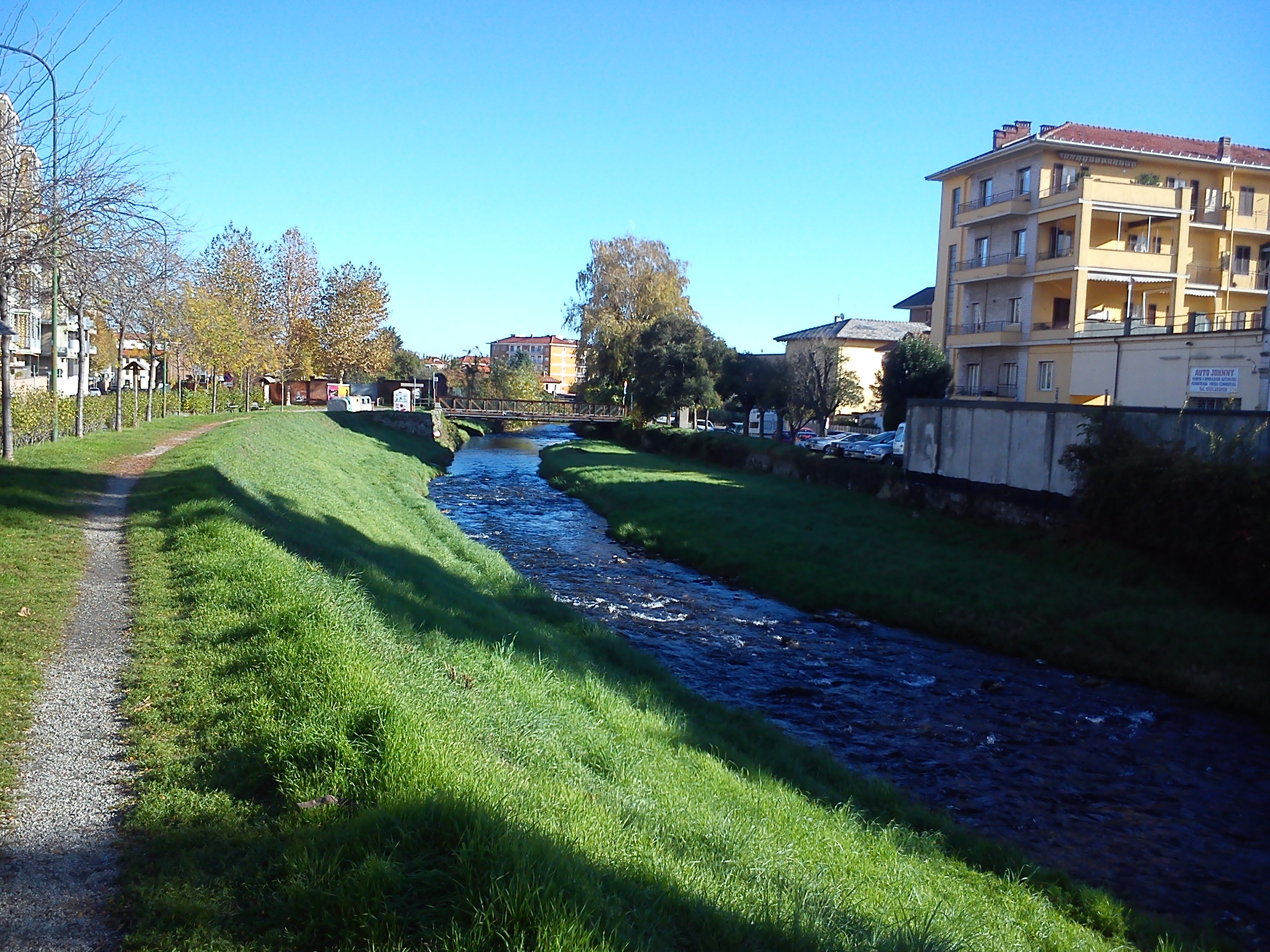 Il torrente Lemina a Pinerolo